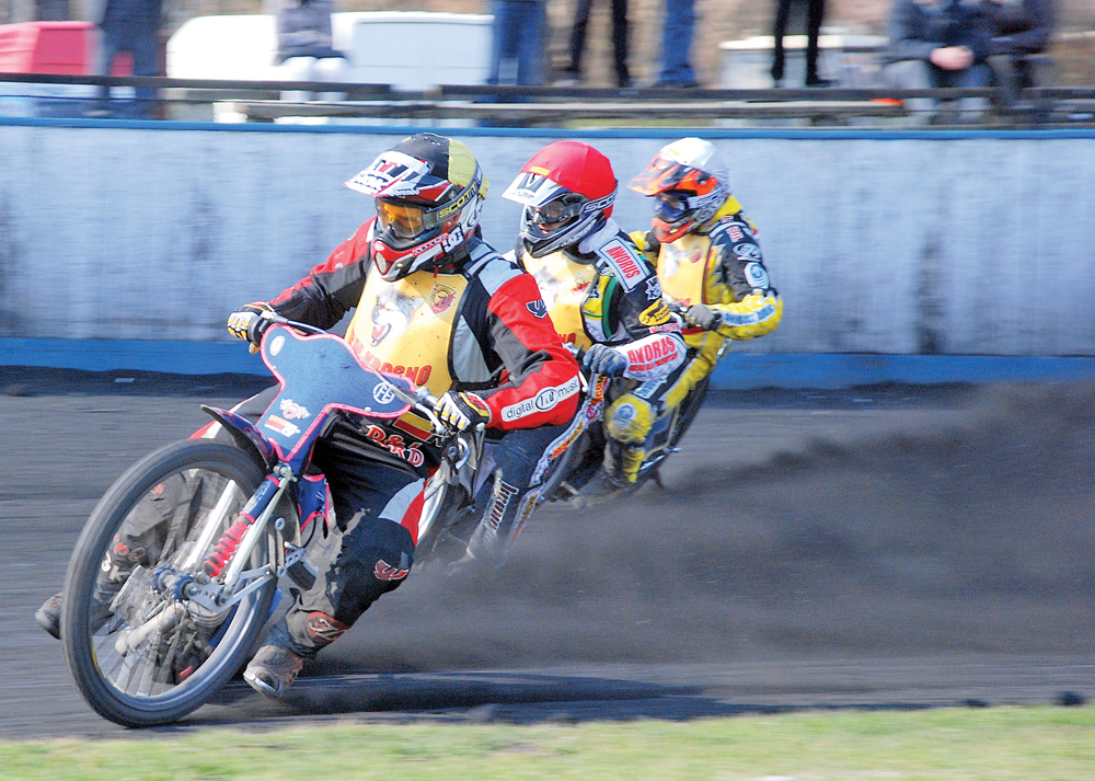 Żużlowcy drużyny KSM KROSNO. Autorem zdjęcia jest Przemysław Niepokój-Hepnar.